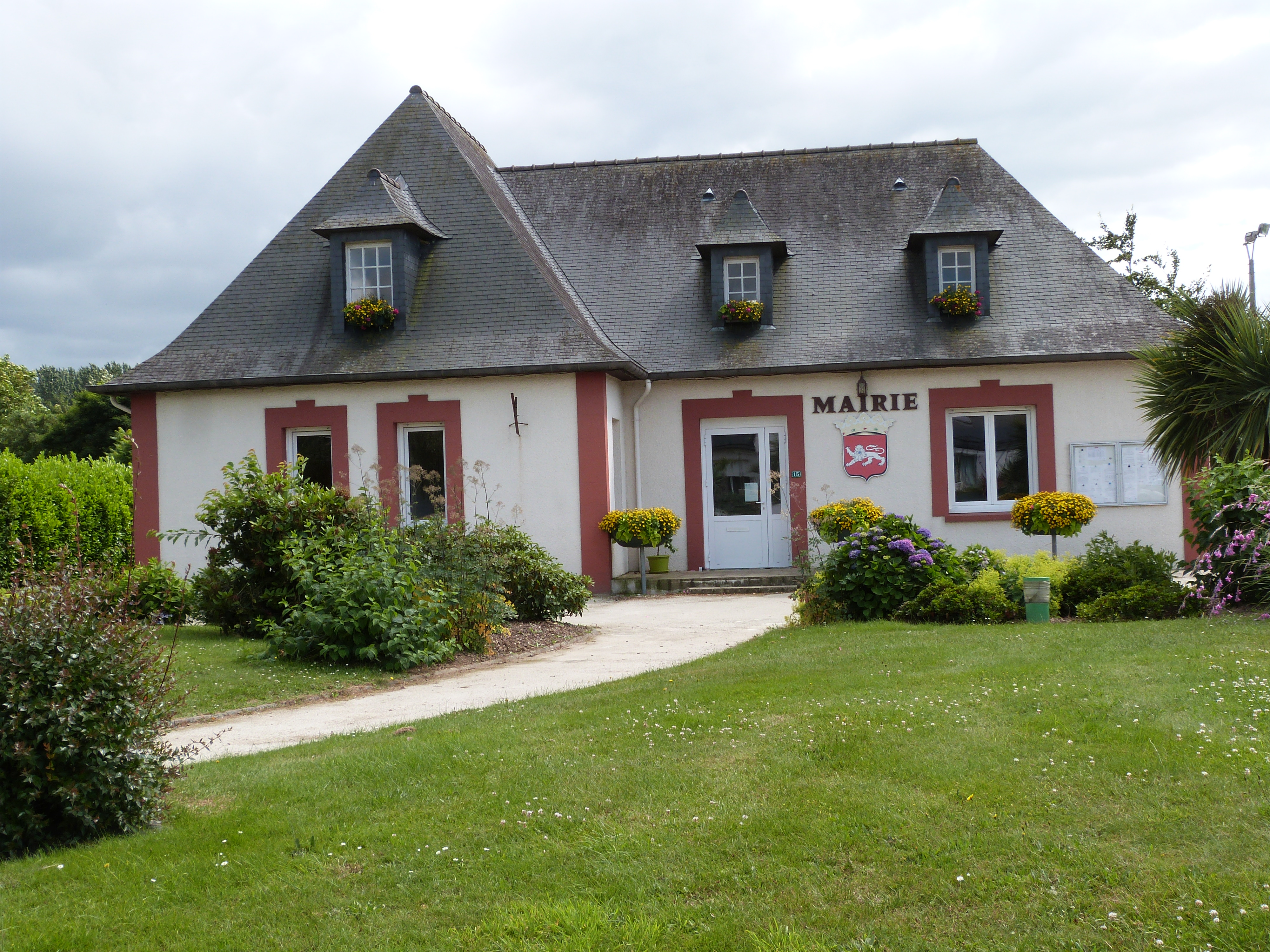 Mairie de Bréhand